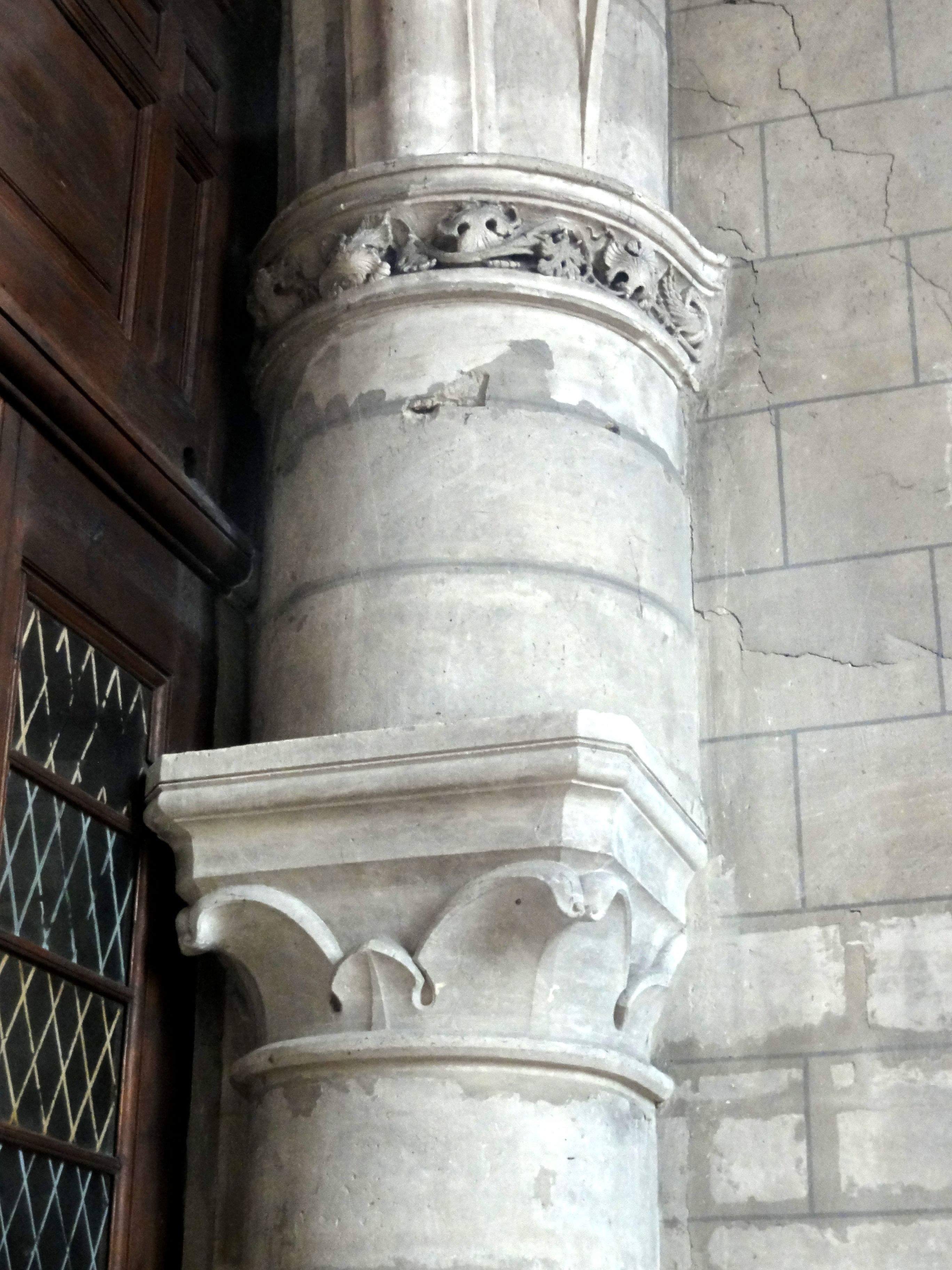 Nef, chapiteaux au revers de la façade au début des grandes arcades du nord.